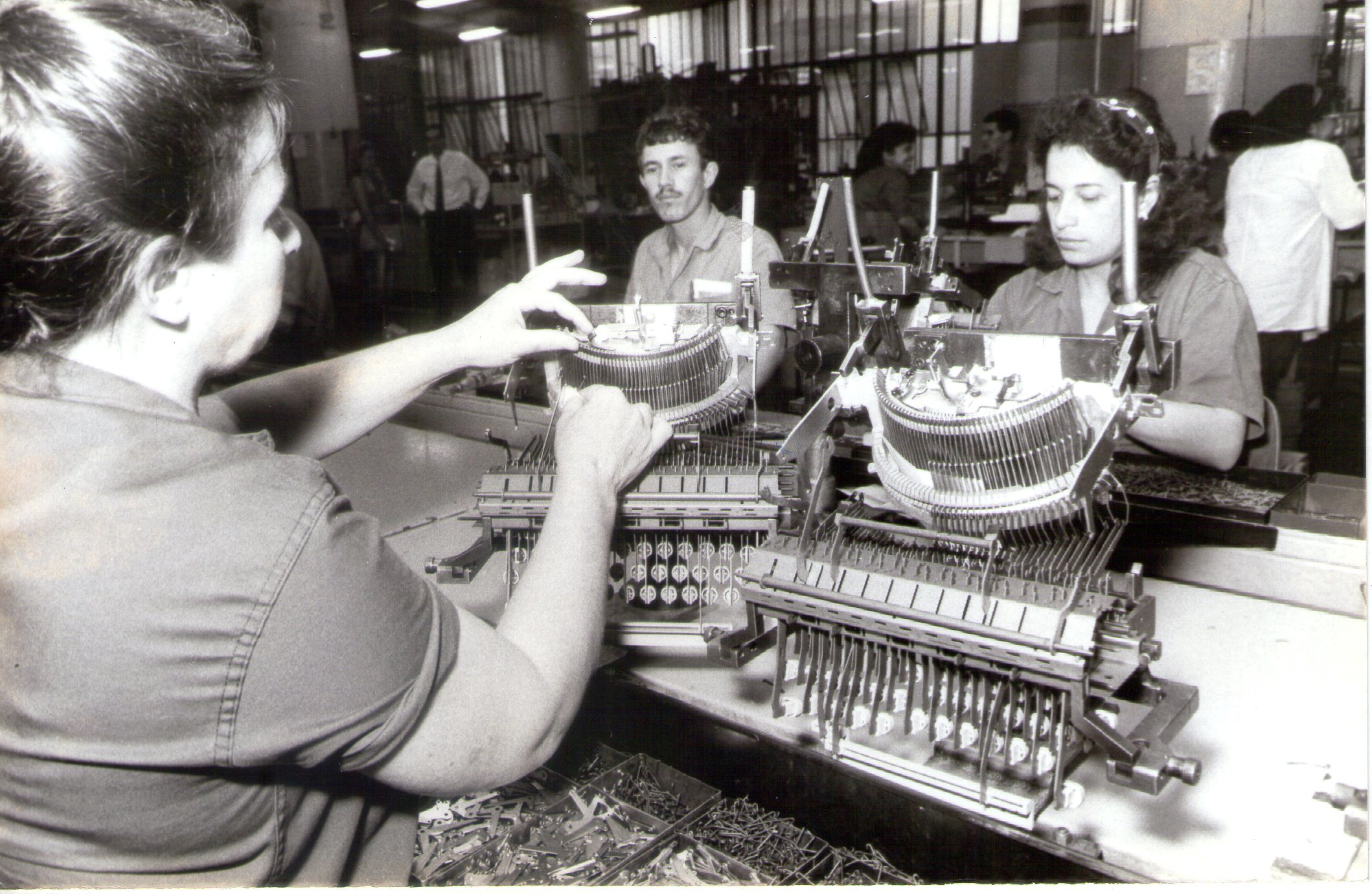 Trabalhadores da Fábrica da Olivetti